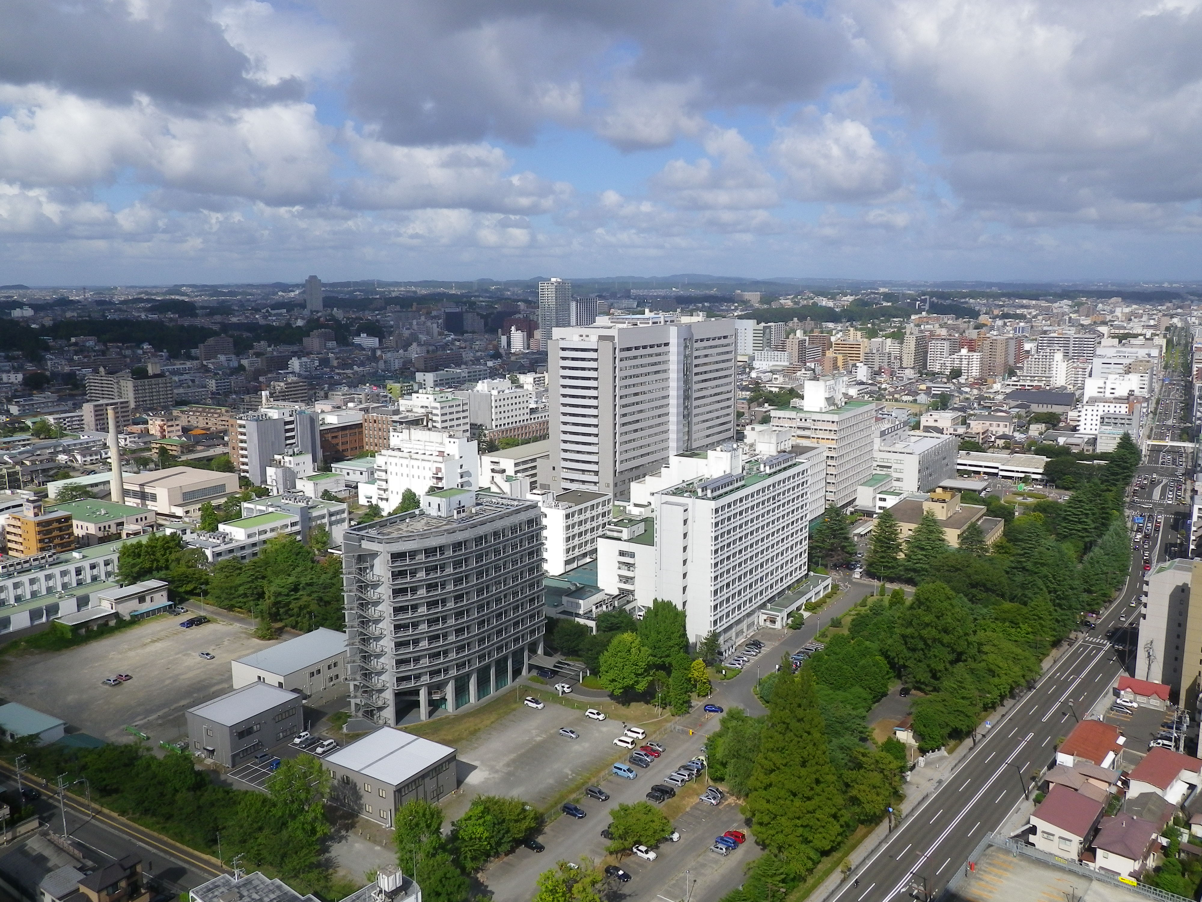 東北大学の星稜キャンパス